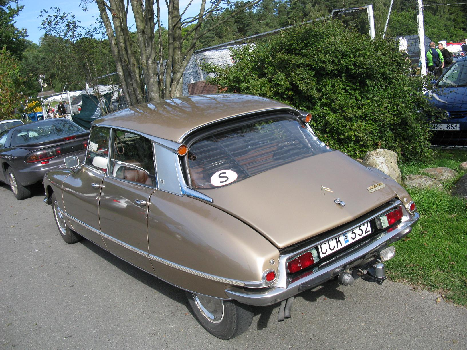 Citroen DS 21